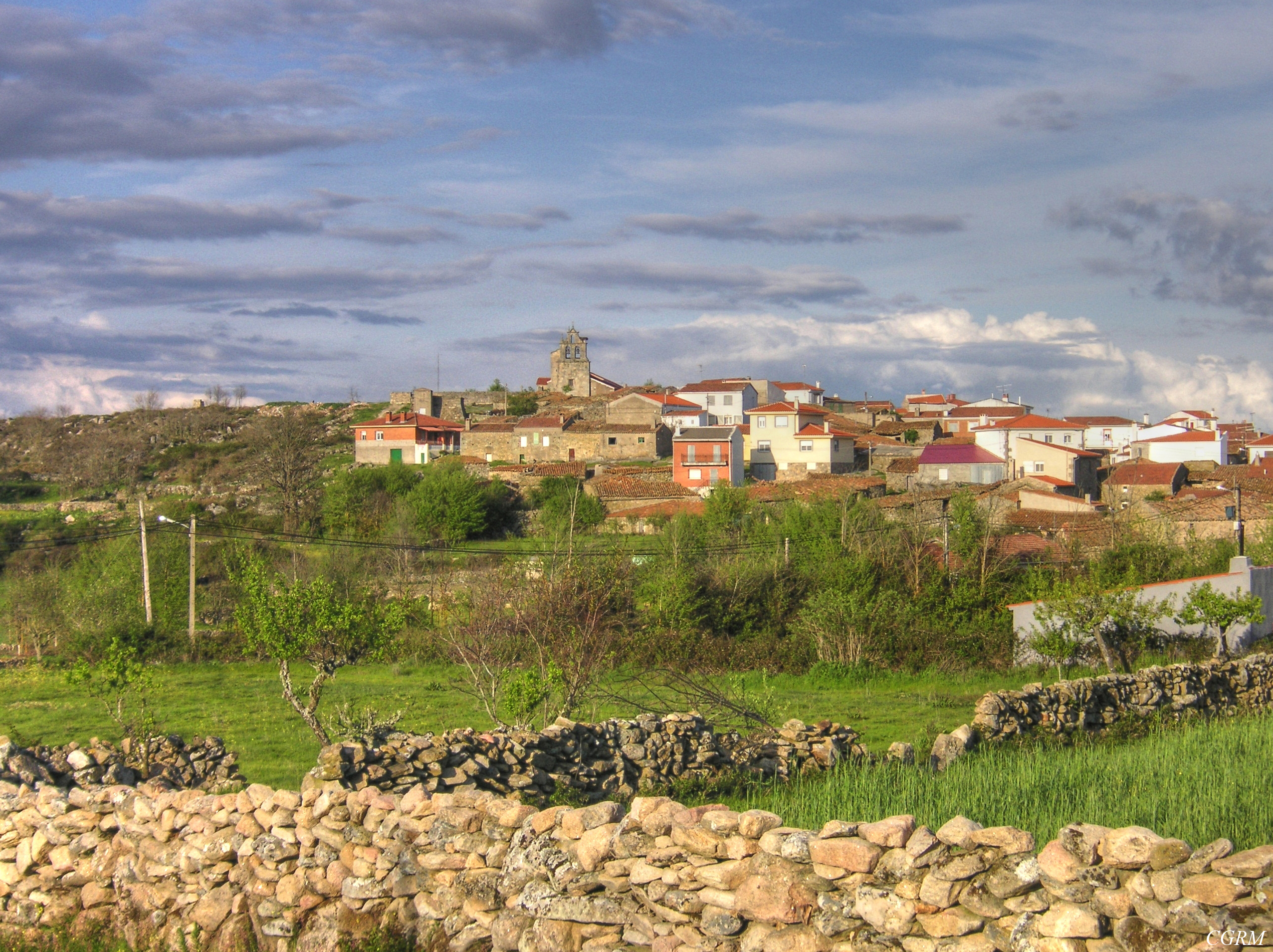 Fotografía del pueblo de Cabeza de Framontanos (Salamanca, España) en los Arribes del Duero.